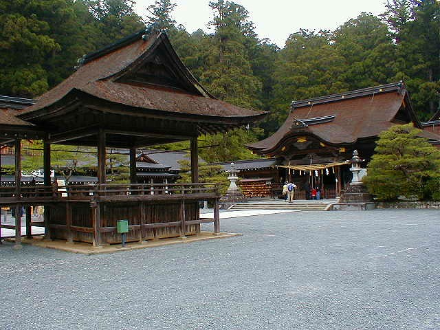 遠江国一之宮小国神社